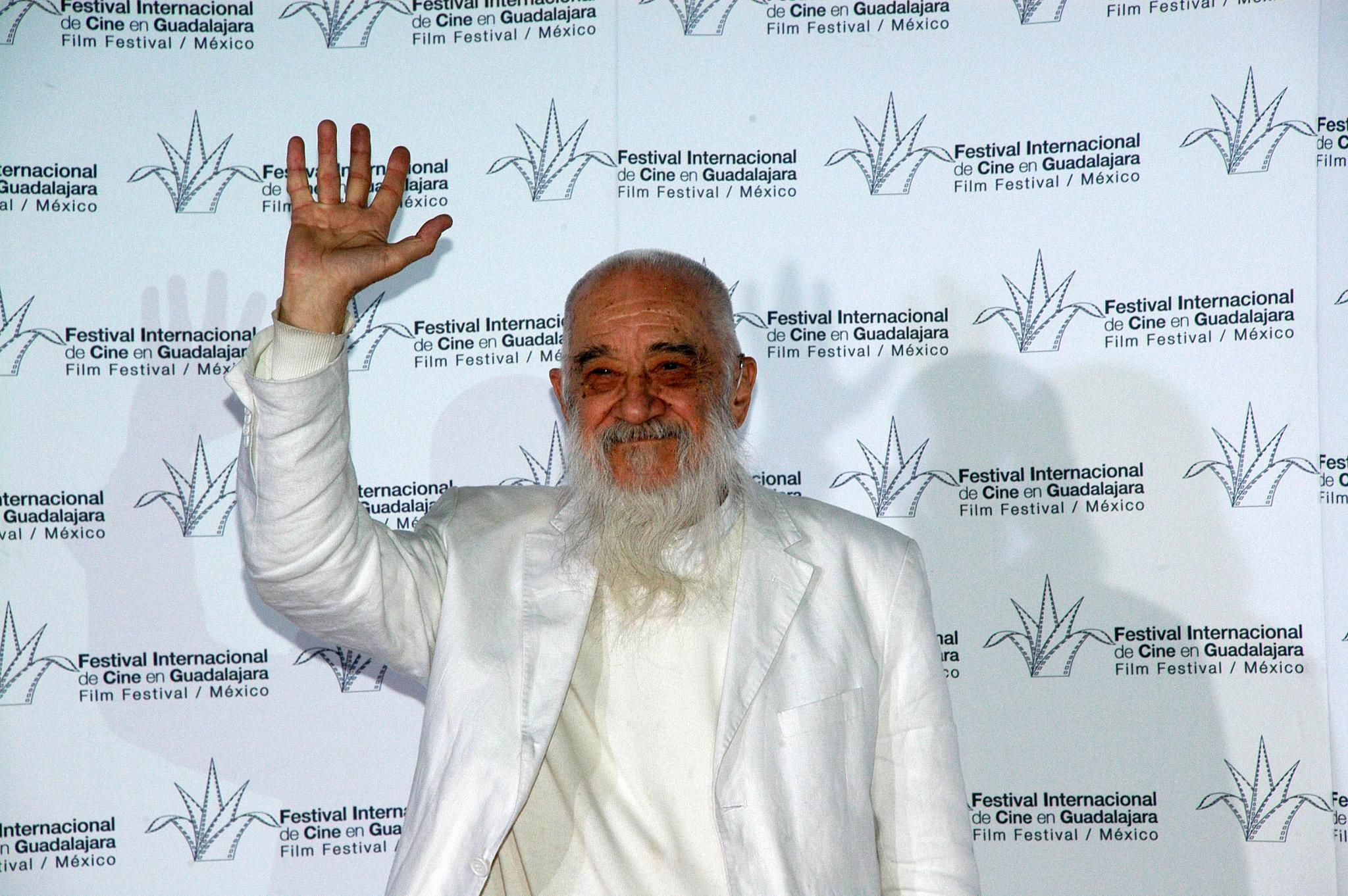 Guadalajara Jalisco 14 Marzo 2008 Fernando Birri en la alfombra roja de la ceremonia de clausura del XXIII Festival Internacional de Cine en Guadalajara